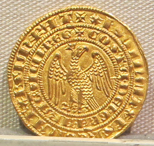 Palazzo Massimo alle Terme